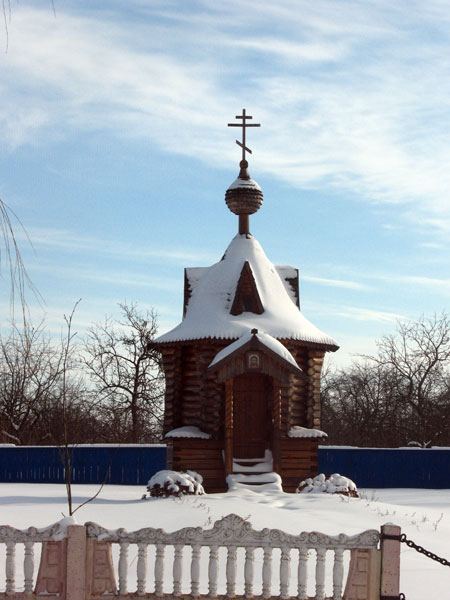 Хальч. Капліца